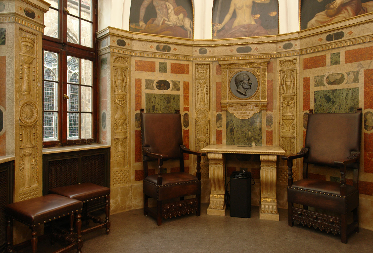 Rathaus in Bremen. „Kaiserzimmer“ neben dem Festsaal.